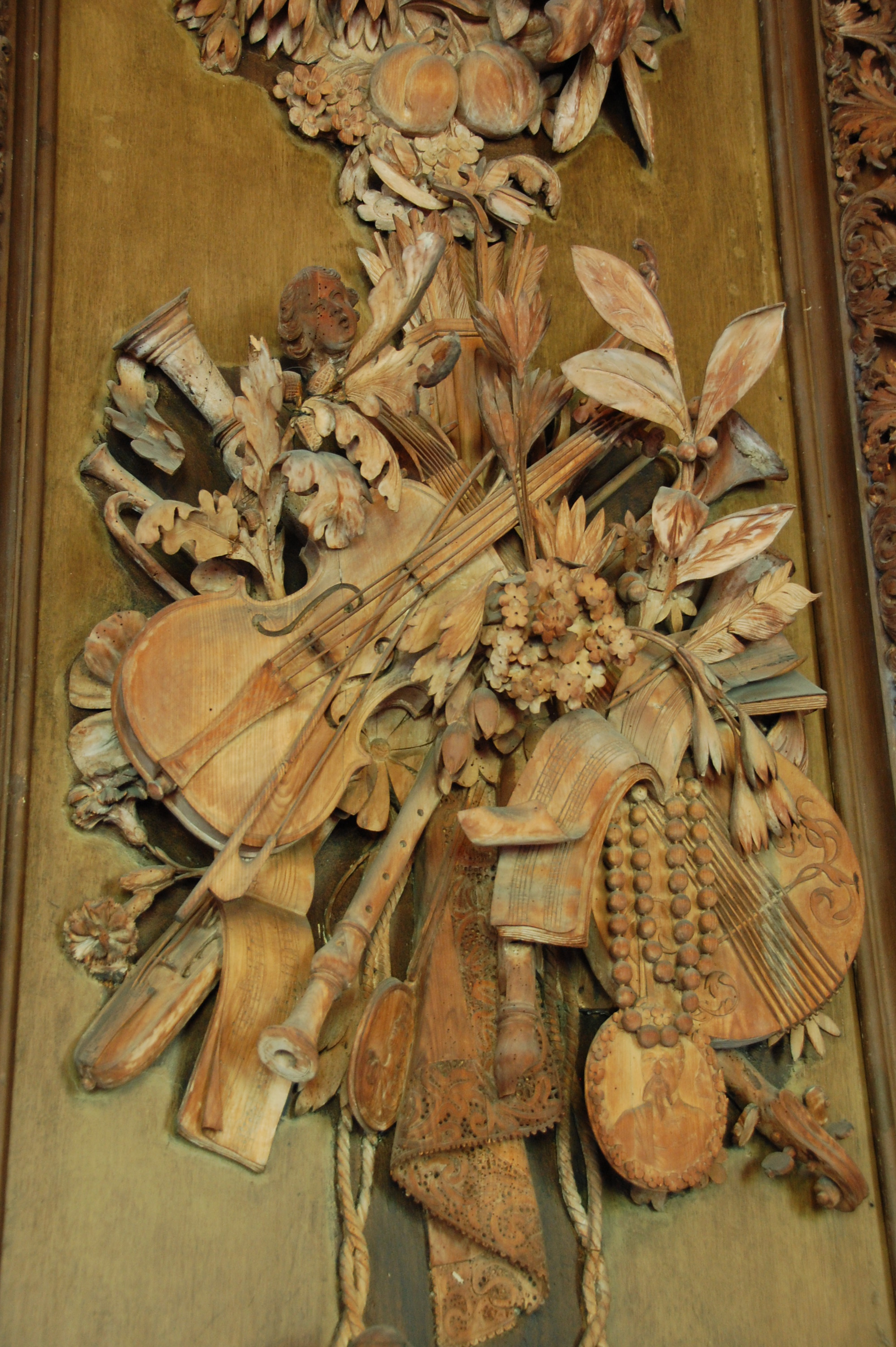 Grinling Gibbons music